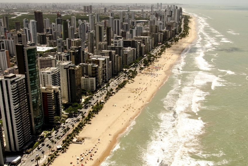 Vista áerea do Recife, Pernambuco, Brasil.